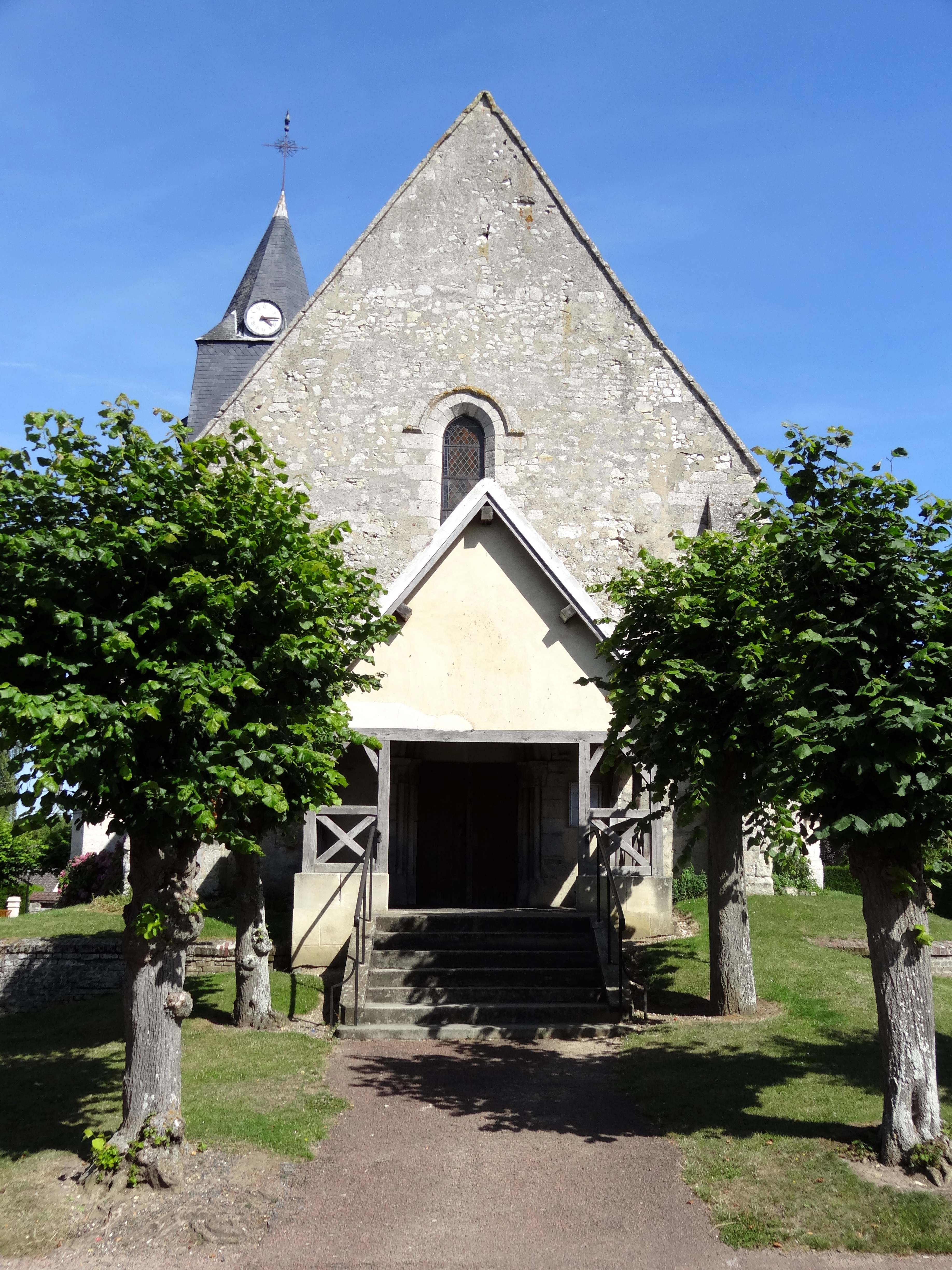 Église Saint-Lucien de Litz - voir titre.